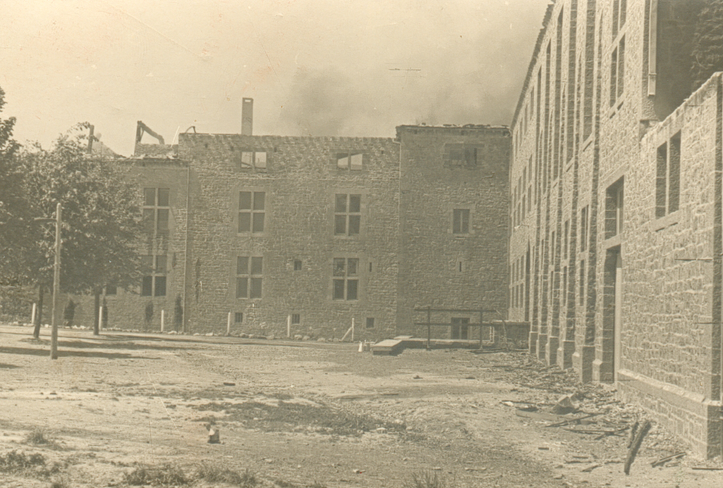 Alumnat Marie-Médiatrice (château de Bure). Incendie du 8 juin 1938. Archives du Collège d'Alzon.